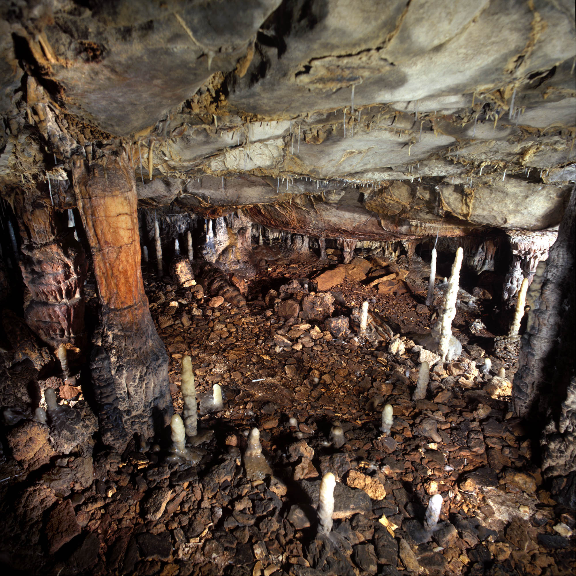 Científicos del Instituto Internacional de Investigaciones Prehistóricas de Cantabria (IIIPC), en colaboración con investigadores de otras universidades y centros de investigación españoles, acaban de publicar en la prestigiosa revista PlosONE un estudio sobre el uso de una piel de león en el yacimiento de La Garma (Omoño, Cantabria) hace unos 16.000 años. En este sentido, la disposición intacta desde hace unos 16.000 años de los suelos de ocupación de la Zona IV de La Garma, permite observar, sin necesidad de excavar, las bases de piedra de al menos dos cabañas circulares y los restos óseos de los animales que allí se procesaron y consumieron. Estos restos incluyen nueve garras de león de las cavernas (Panthera spelaea) con marcas de corte cuya distribución espacial indica que se trataba de una piel extendida posiblemente sobre una de las cabañas, a modo de cobertura.